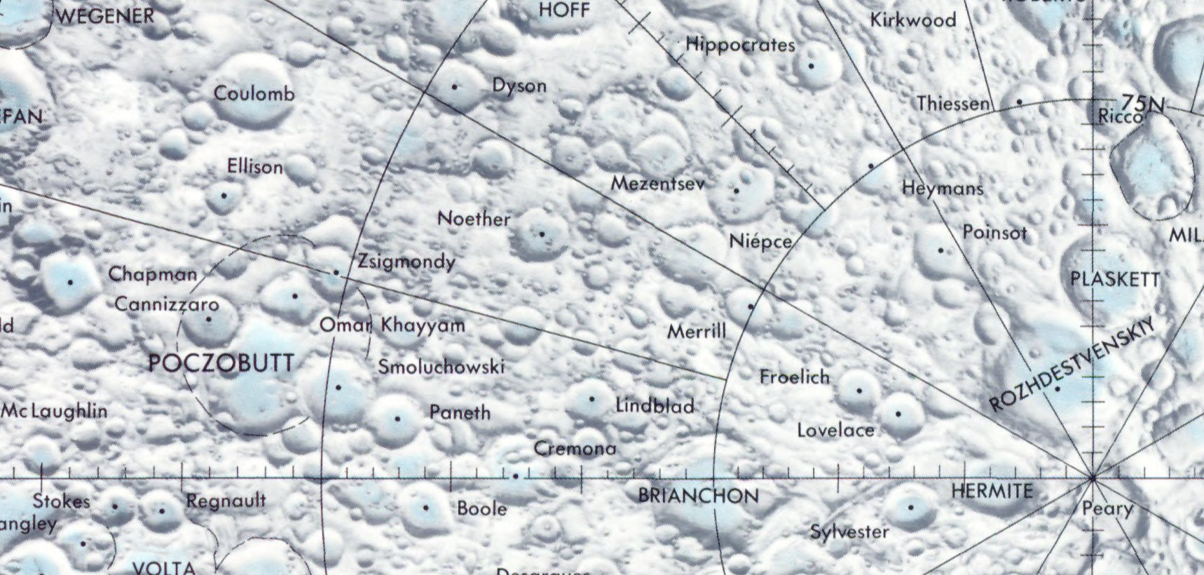 Cráter lunar Zsigmondy. Localización. (Lunar Chart LPC1. Second Edition)